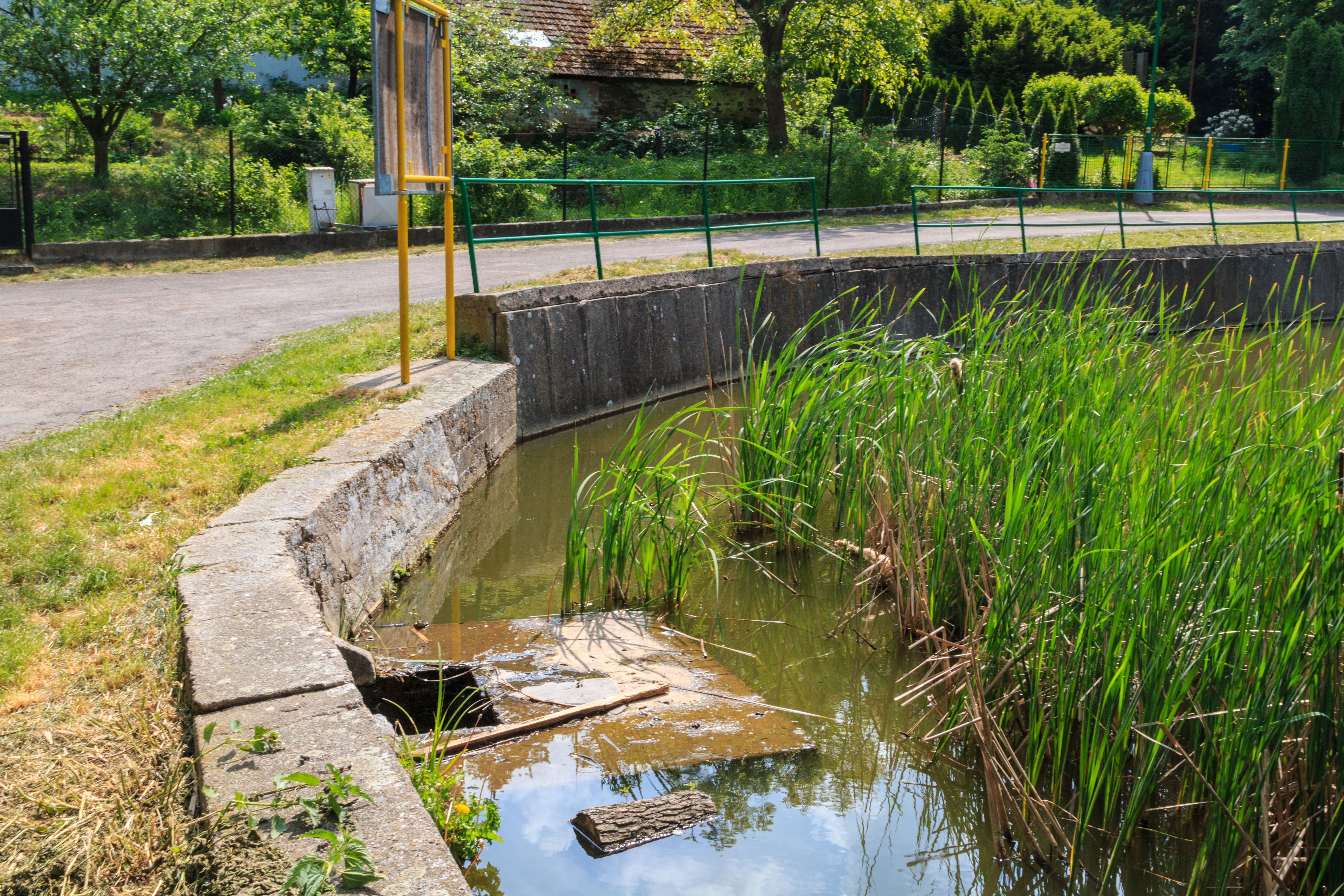 Krasnický rybník